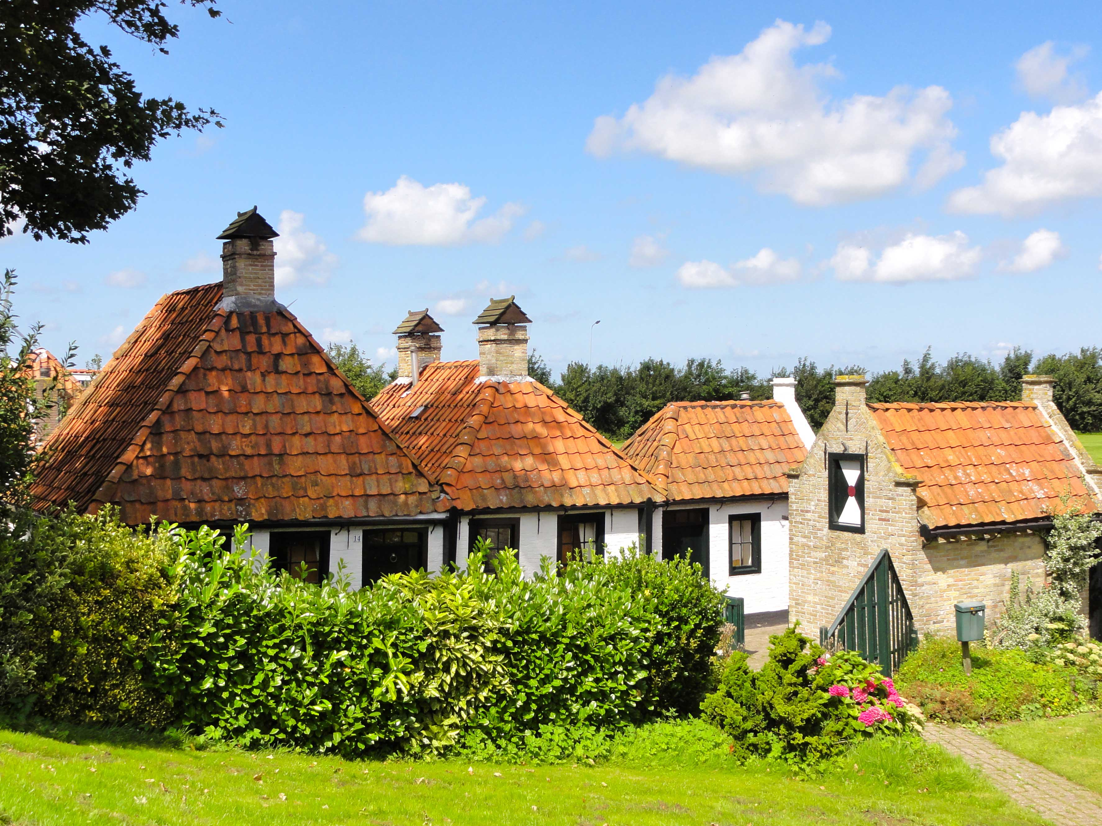 Séburch 14 Workum